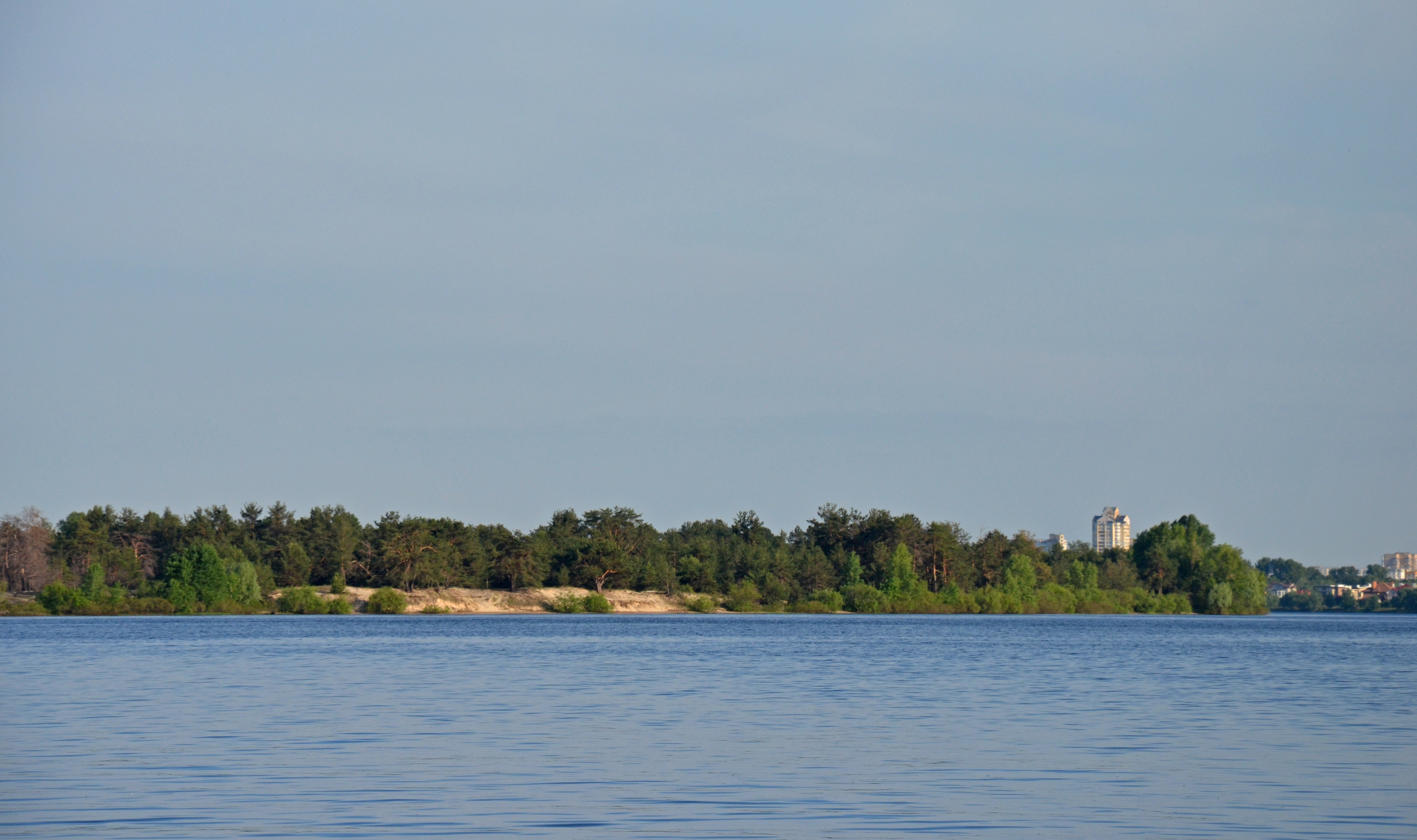 Пташиний рай, м. Вишгород